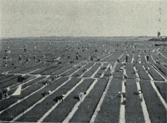 富山県高岡市の田んぼ